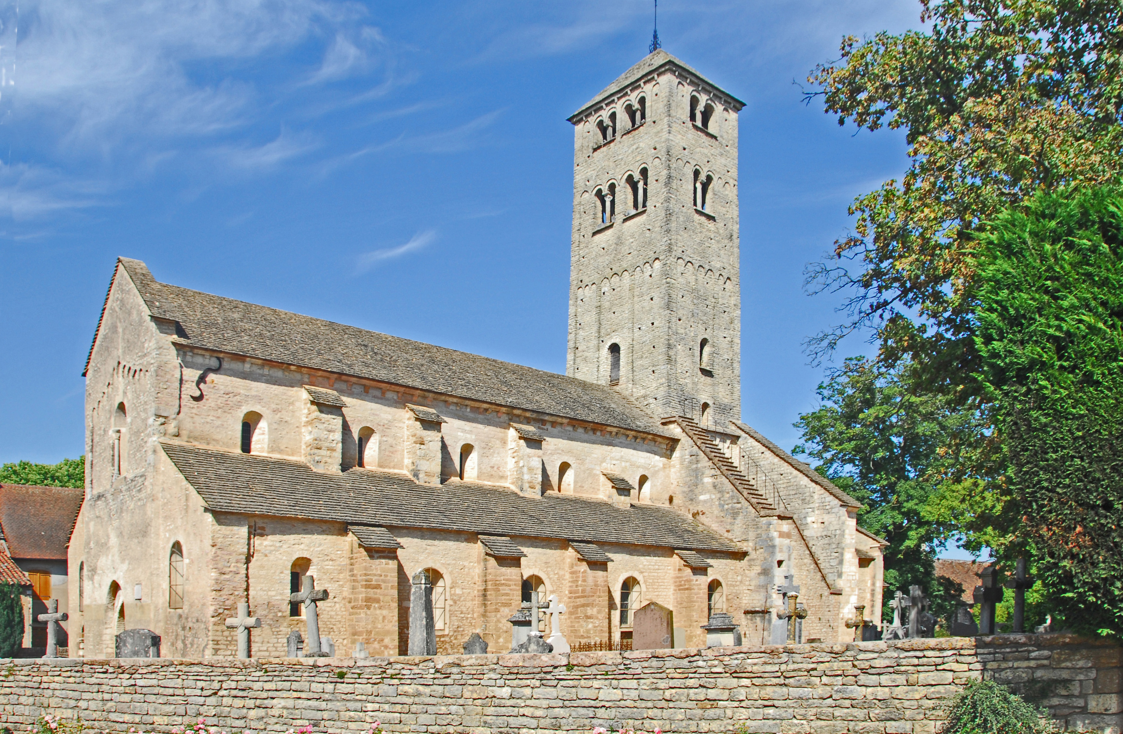 St-Martin_de_Chapaize, Ansich von SW